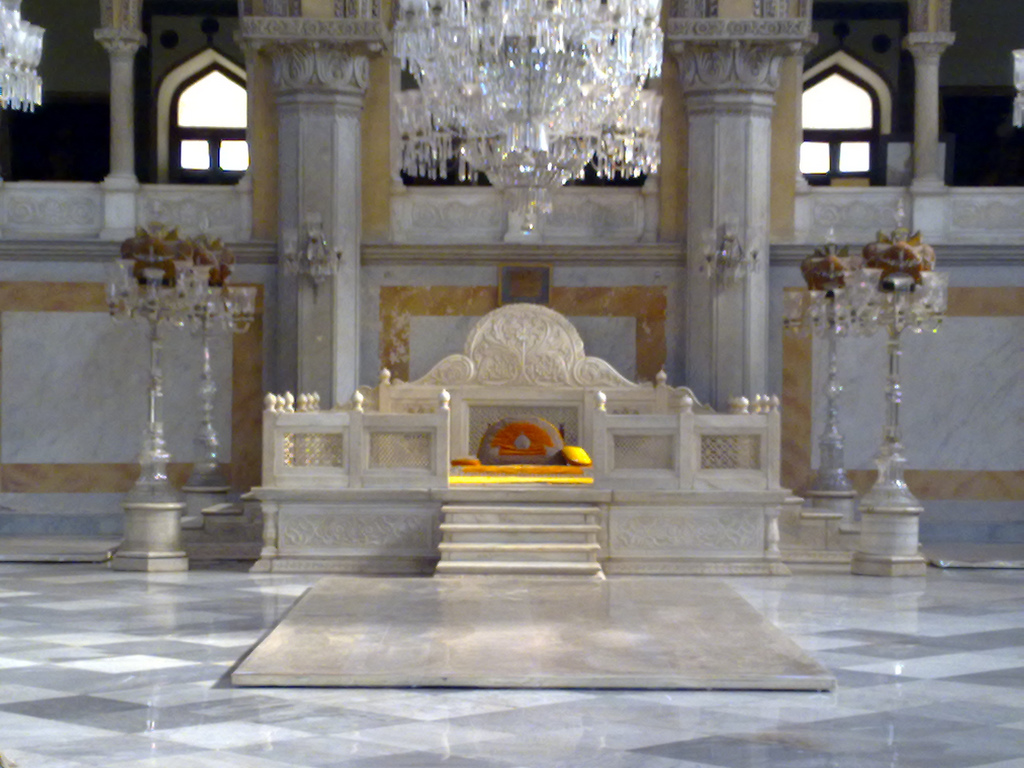 Gaddi - Nizam's Throne